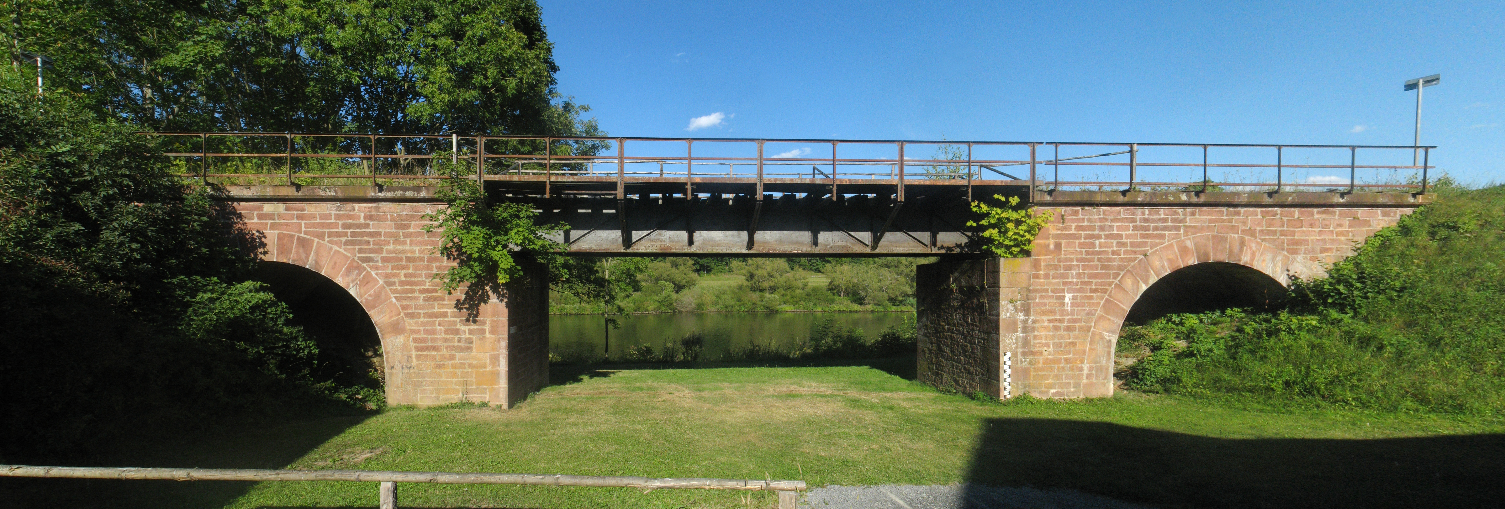 Alte Eisenbahnbrücke im Ort Hafenlohr.